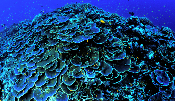 Montipora aequituberculata, en isla Jarvis